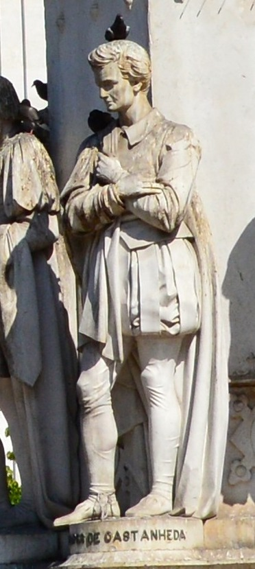 Praça Luis Camoes, Chiado